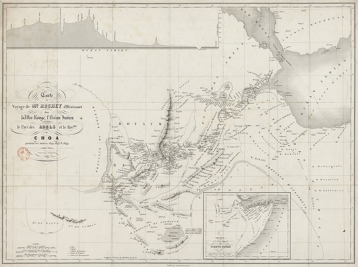 Carte du Voyage de Mr Rochet d'Héricourt dans la Mer Rouge, l'Océan Indien, le Pays des Adels et le Royaume de Choa pendant les Années 1842, 1843 et 1844. Echelles, Kylometres de 111 au degré 110 =Om. 057 ; 1 : 1 915 700 environ. Bibliothèque nationale de France, département Cartes et plans, GE D-15090